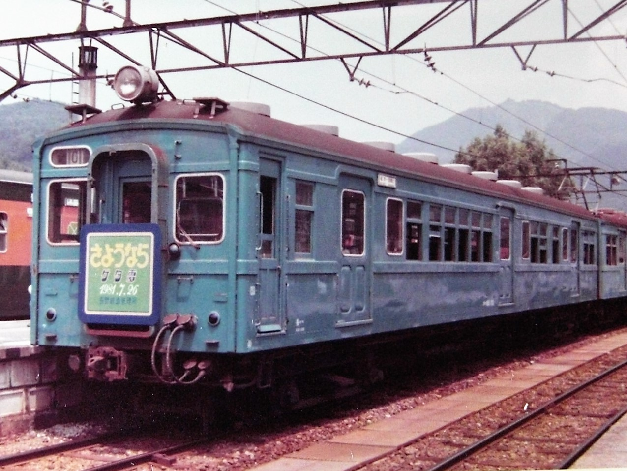 国鉄クハ68形電車 68011